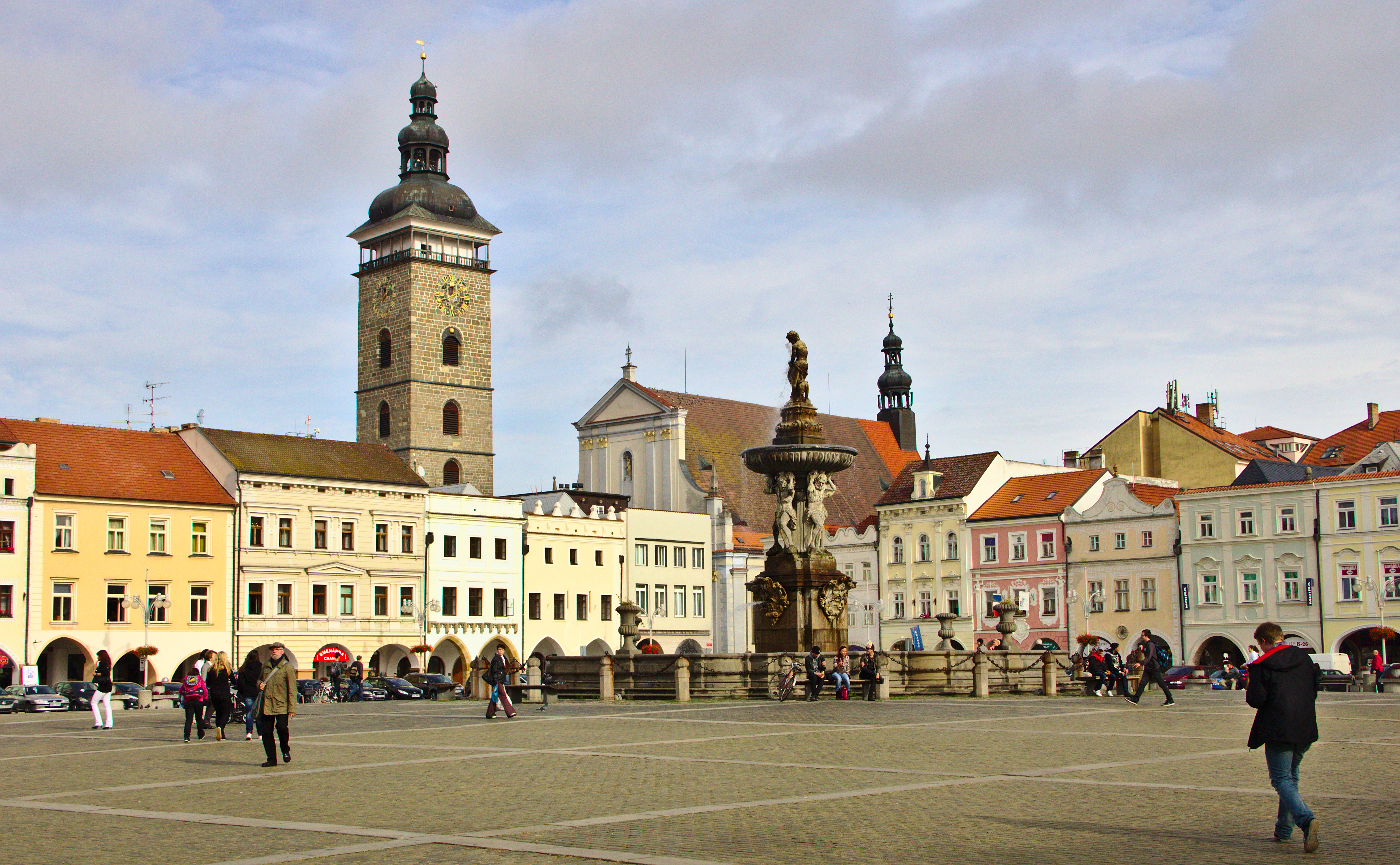 Náměstí Přemysla Otakara II. je centrální veřejné prostranství v historickém středu Českých Budějovic, v současné době pojmenované po zakladateli města, českém králi Přemyslu Otakaru II, rozlohou 1,7 ha je jedním z největších, a po Vysokém Mýtě druhým největším čtvercovým náměstím v České republice.